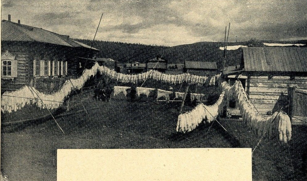 Konservator E. Pfitzenmayer, St. Petersburg: Sibirische Rauchwaren (1908), Nr. 43, S. 1869 Zum Trocknen aufgehängte Eisfuchsfelle (2500 Stück) des größten nordsibirischen Fellhändlers in Bulun.